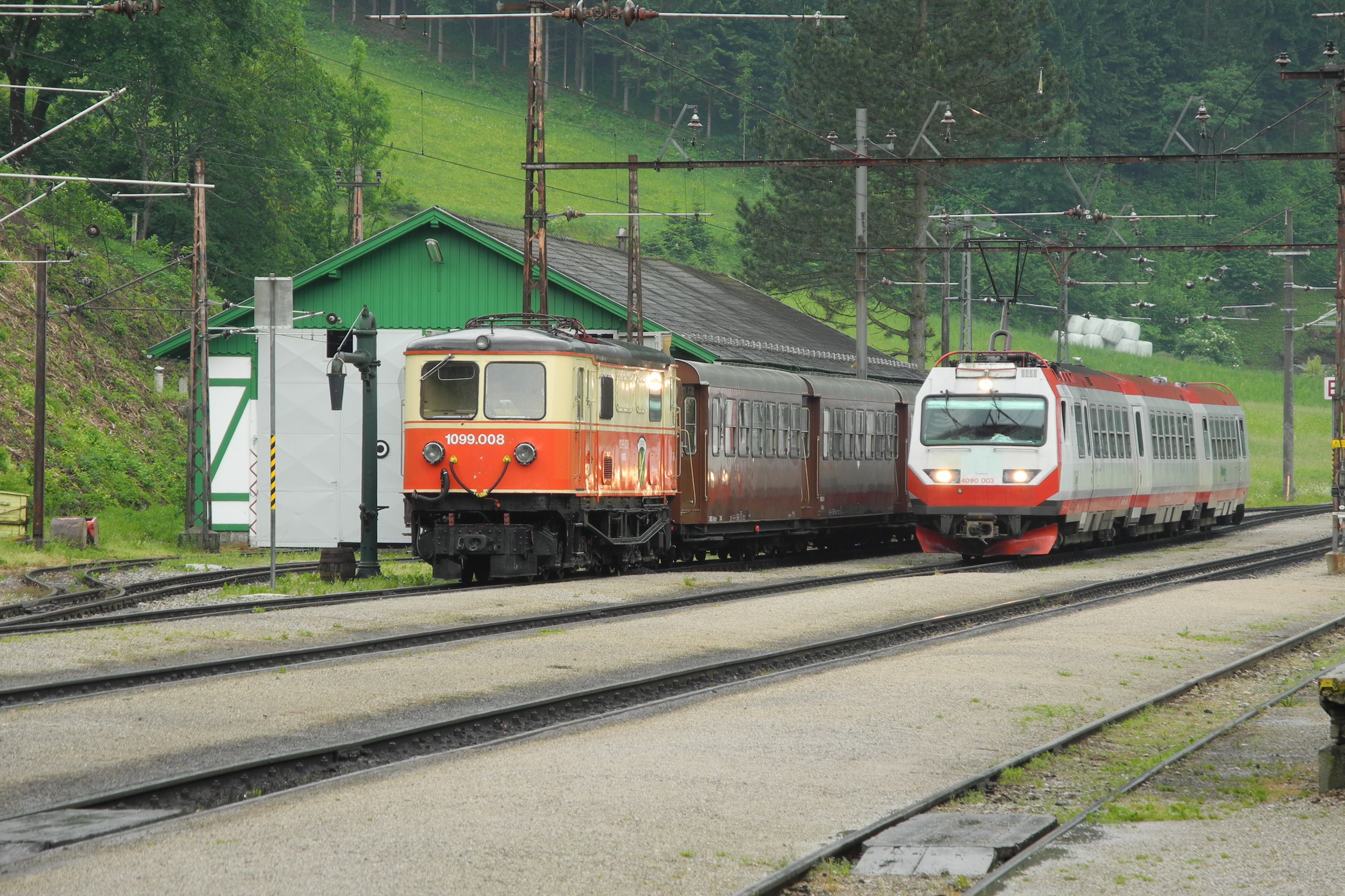 1099.008 und 4090.003 im Bahnhof Laubenbachmühle.